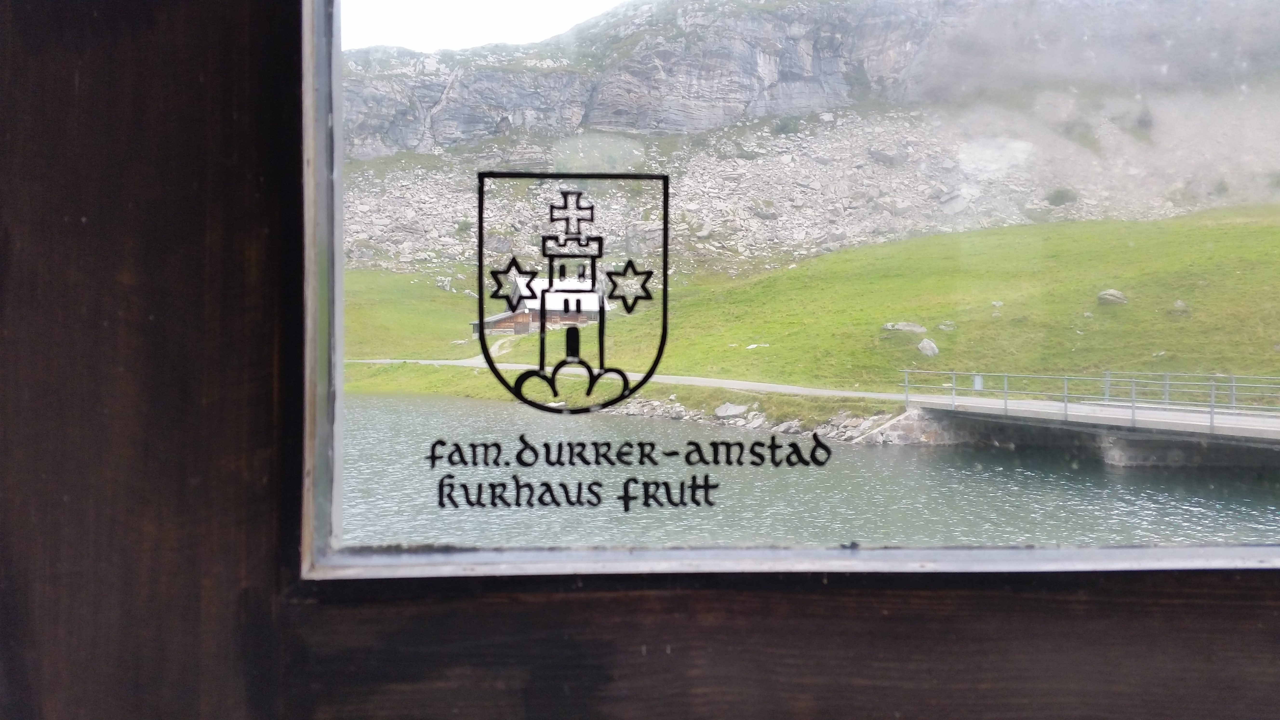 Wappen für die Fenster von Bepp Haas, 2018